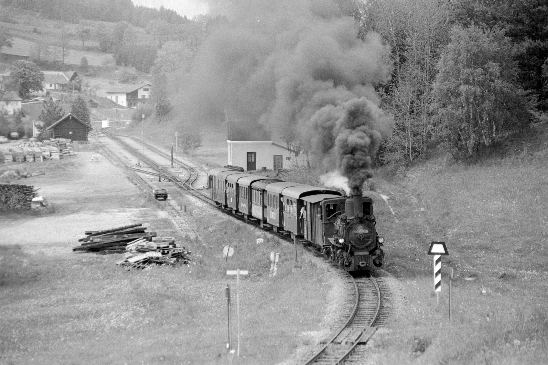 en: ÖBB 399.02 leaving Steinbach-Groß Pertholz station on the Waldviertel Narrow Gauge Railways on the line to Groß Gerungs, Lower Austria de: ÖBB 399.02 verläßt den Bahnhof Steinbach-Groß Pertholz an der Strecke der Waldviertler Schmalspurbahnen nach Groß Gerungs.